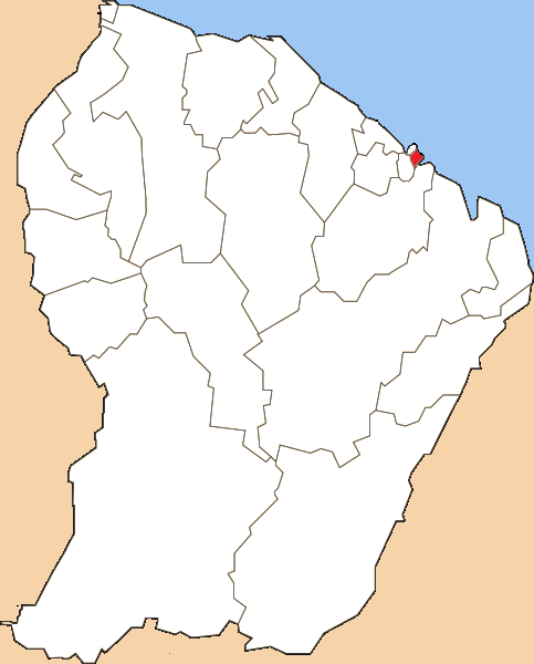 Situation du canton dans le département de la Guyane